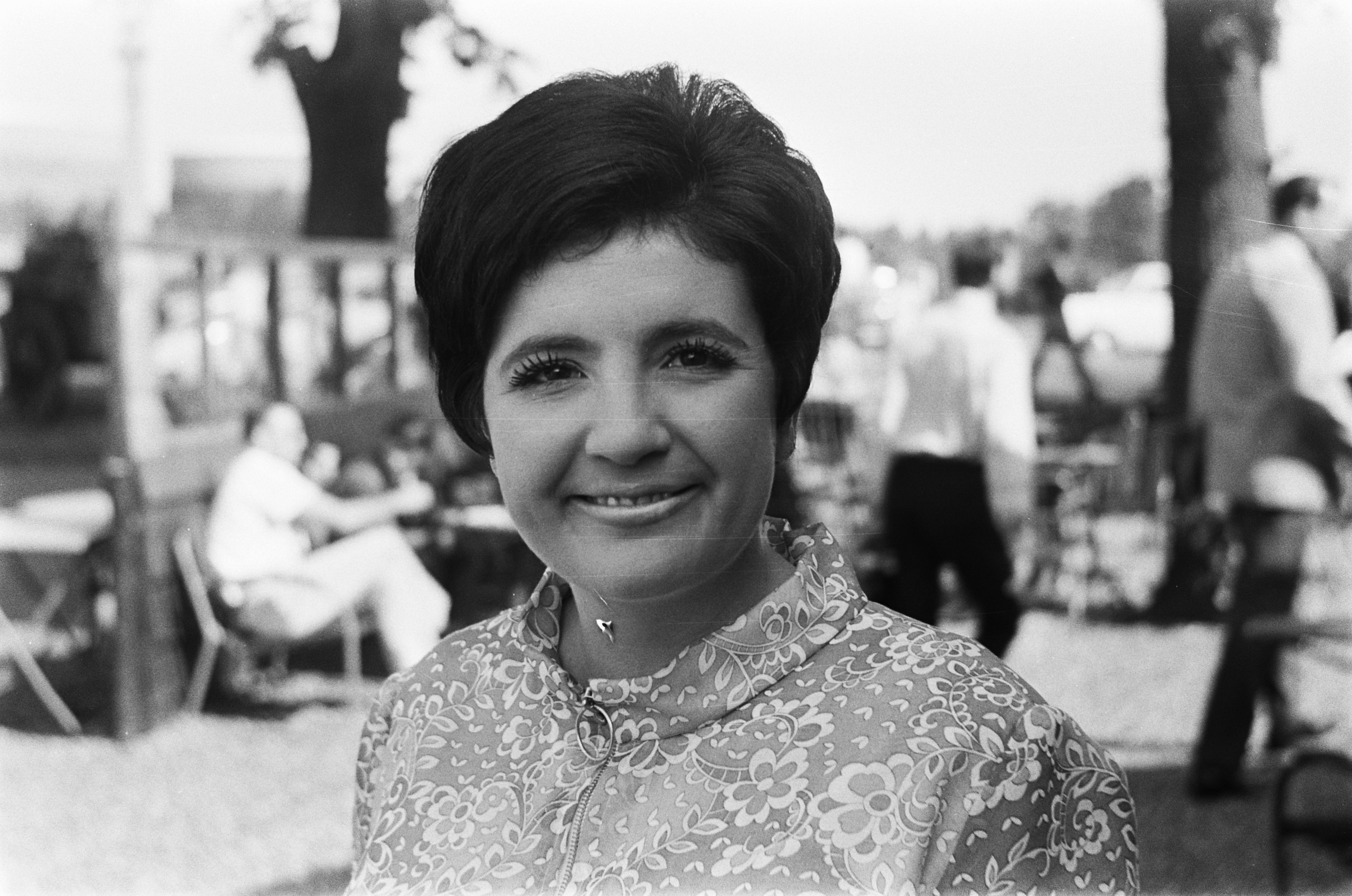 Collectie / Archief : Fotocollectie Anefo Reportage / Serie : [ onbekend ] Beschrijving : Knokkeploeg voorgesteld te Amsterdam voor het Knokke Songfestival nr. 22 , 23: Marjol Flore , kop, nr. 24 25: Annet Hesterman , kop Datum : 11 juni 1969 Locatie : Amsterdam, Noord-Holland Trefwoorden : Songfestivals Persoonsnaam : Annet Hesterman, Flore, Marjol Fotograaf : Evers, Joost / Anefo Auteursrechthebbende : Nationaal Archief Materiaalsoort : Negatief (zwart/wit) Nummer archiefinventaris : bekijk toegang 2.24.01.05 Bestanddeelnummer : 922-5123